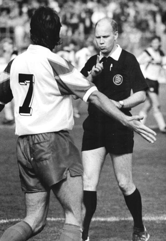 ADN-Matthias Hiekel-15.9.90-Dresden: Fußball-Oberliga-FC Dynamo Dresden - Chemnitzer FC 1:1 (1:1) Die "böse" Nummer 7, Dirk Barsikow aus Chemnitz, empfängt die ersten Signale der Bundesliga. Als erster Bundesliga-Referee leitete Dr. Wolf-Rüdiger Umbach diese Oberliga-Partie.